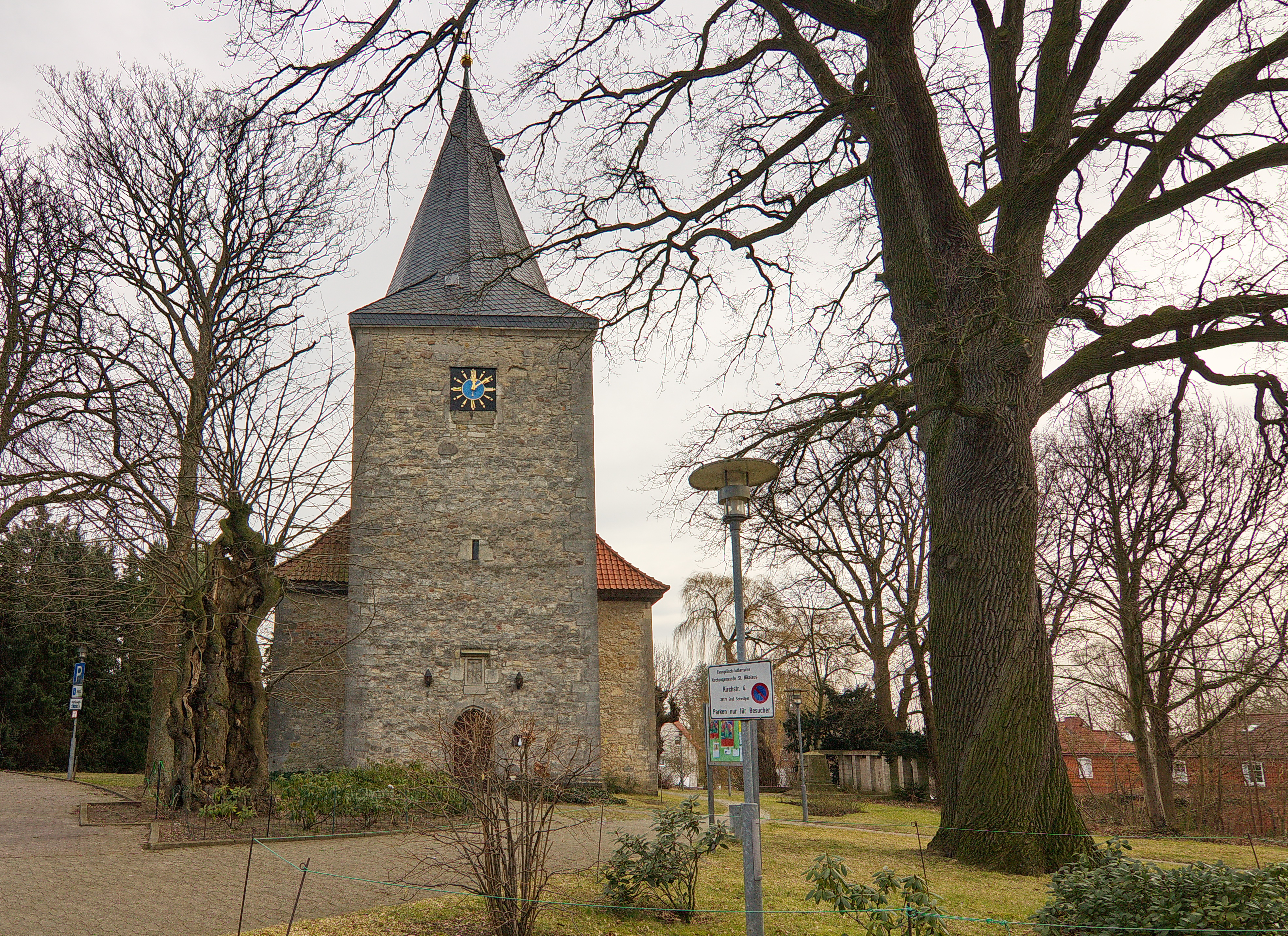 St.-Nikolai-Kirche in Groß Schwülper (Schwülper), Niedersachsen, Deutschland